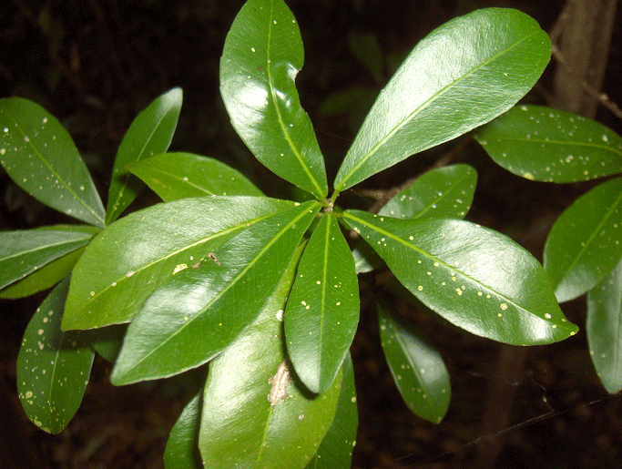 Gymnanthes lucida (Crabwood), Florida